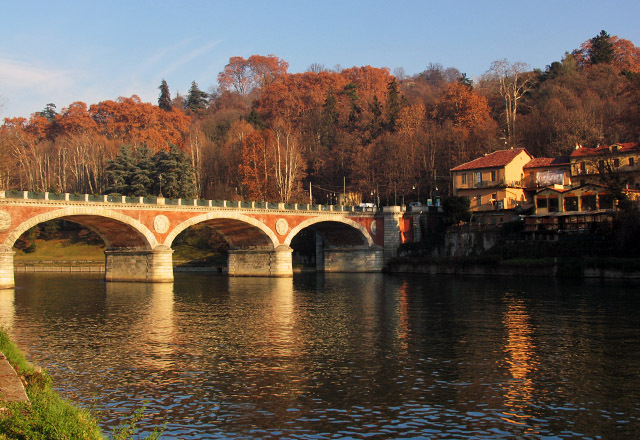 Ponte Principessa Isabella - Torino 12/2006